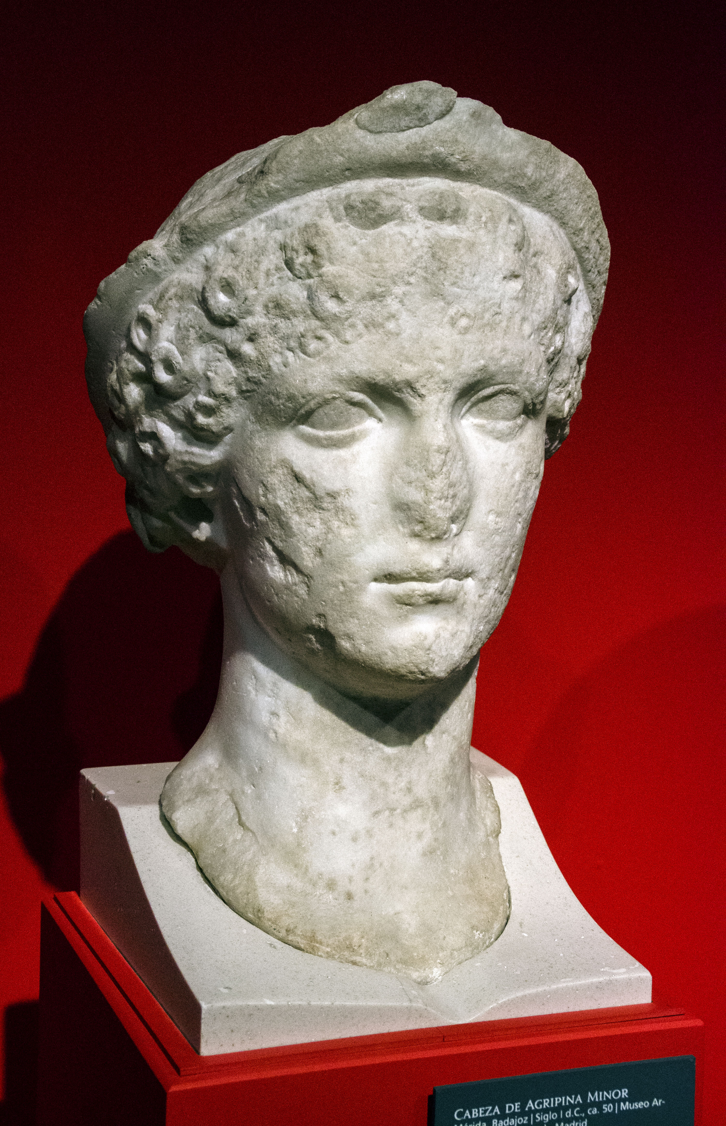 Retrato de Agripina la menor (15-59 d.C.), hija de Germánico. Está realizado en mármol y mide 48 cm de altura. Se encontró en Mérida, España, y se expone en el Museo Arqueológico Nacional (núm. de inventario 34433)